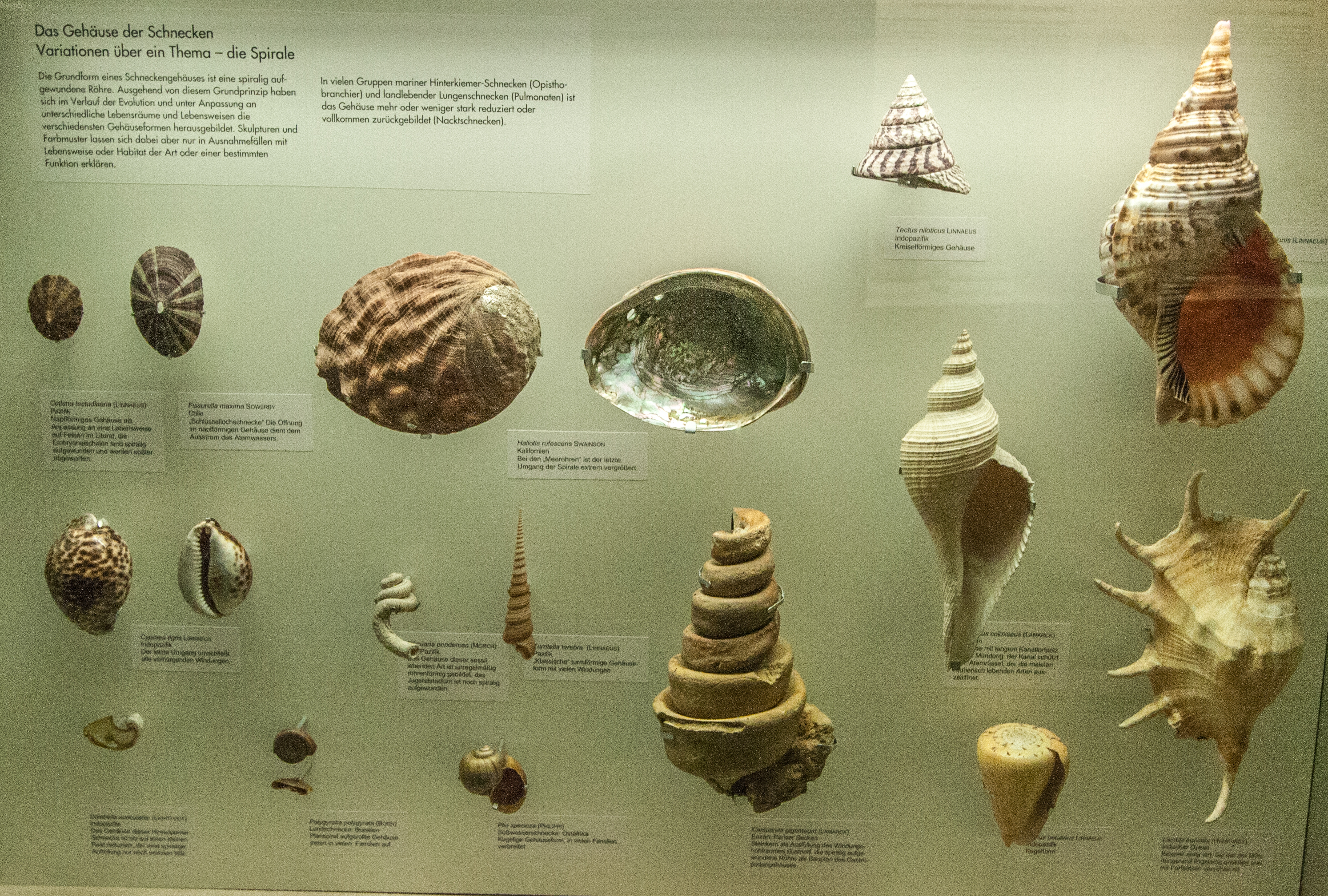 Snails